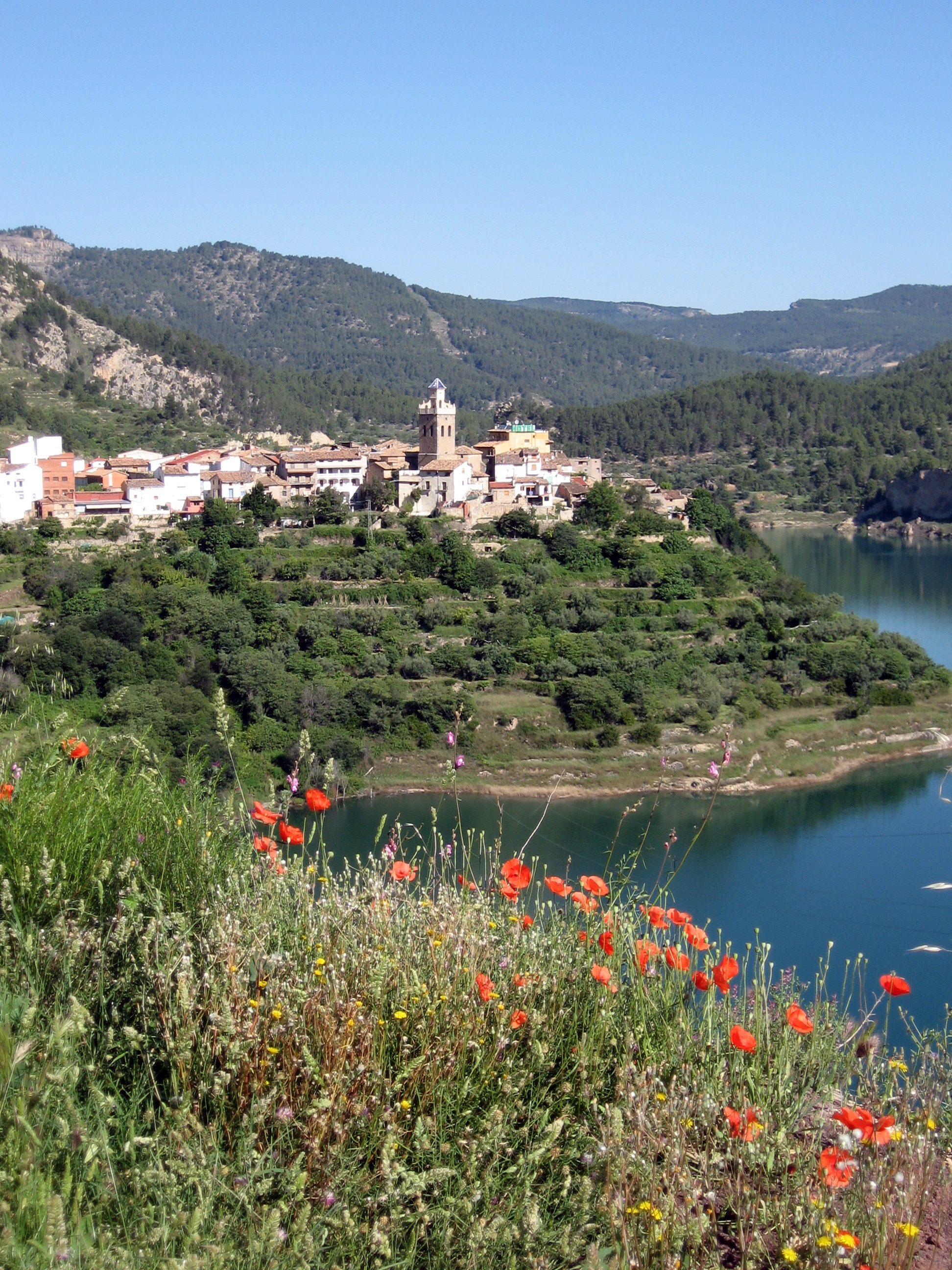 Puebla de Arenosa above Montanejos.